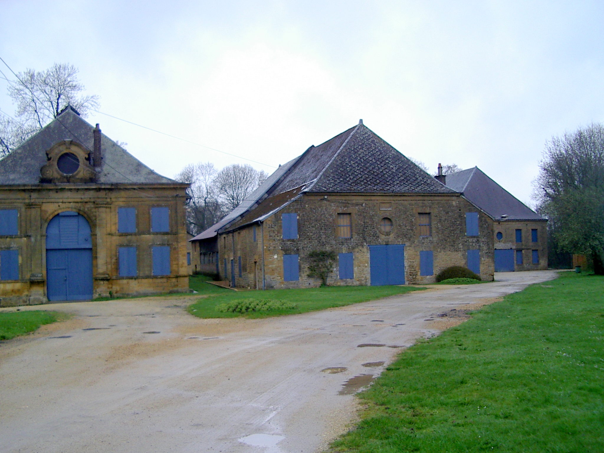 Forges Gendarme zu Vrignes-aux-Bois